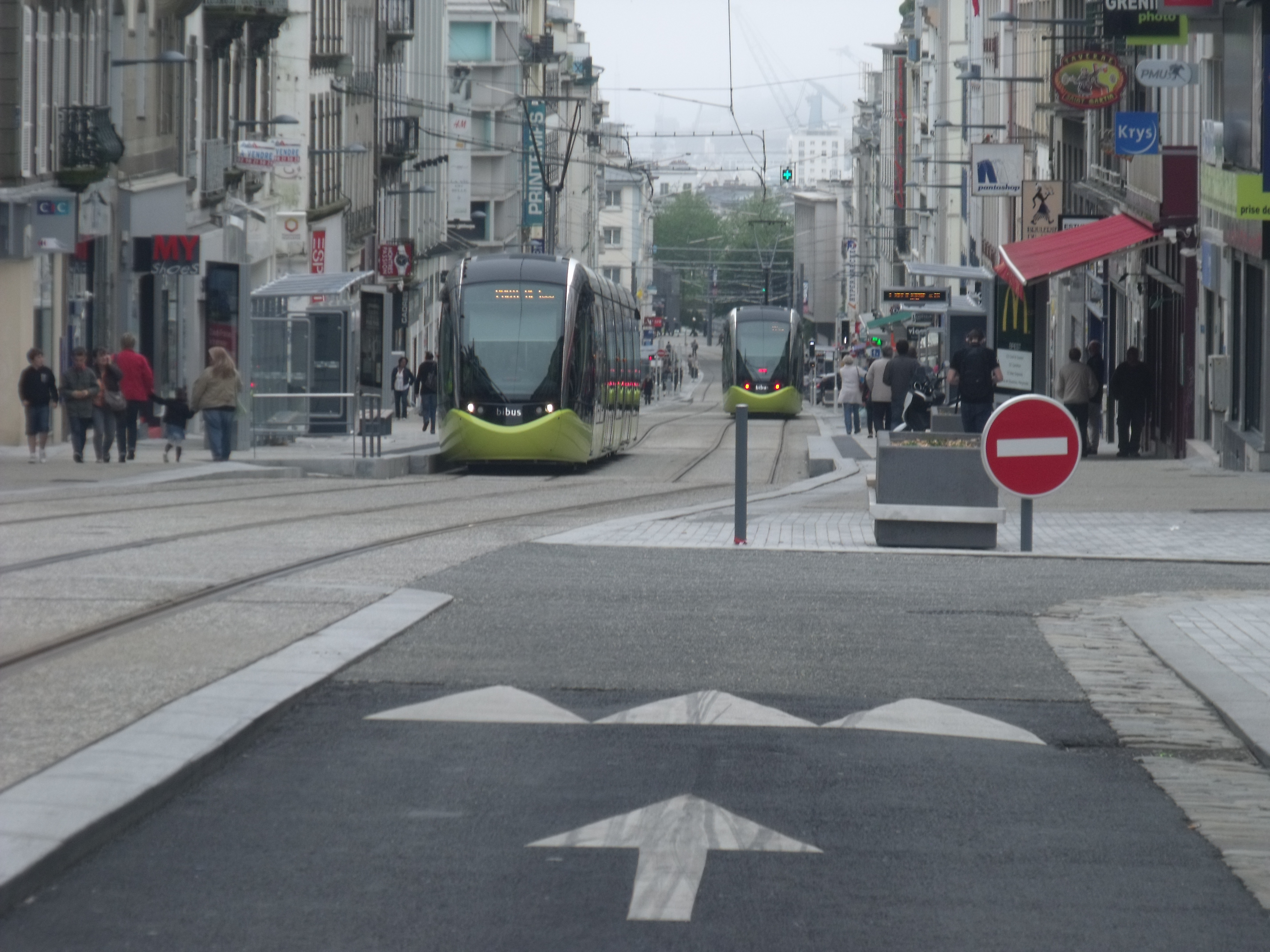 Tranvía en Brest (Finisterre) en julio de 2012